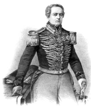 Rafael Tobias de Aguiar, político e militar brasileiro.